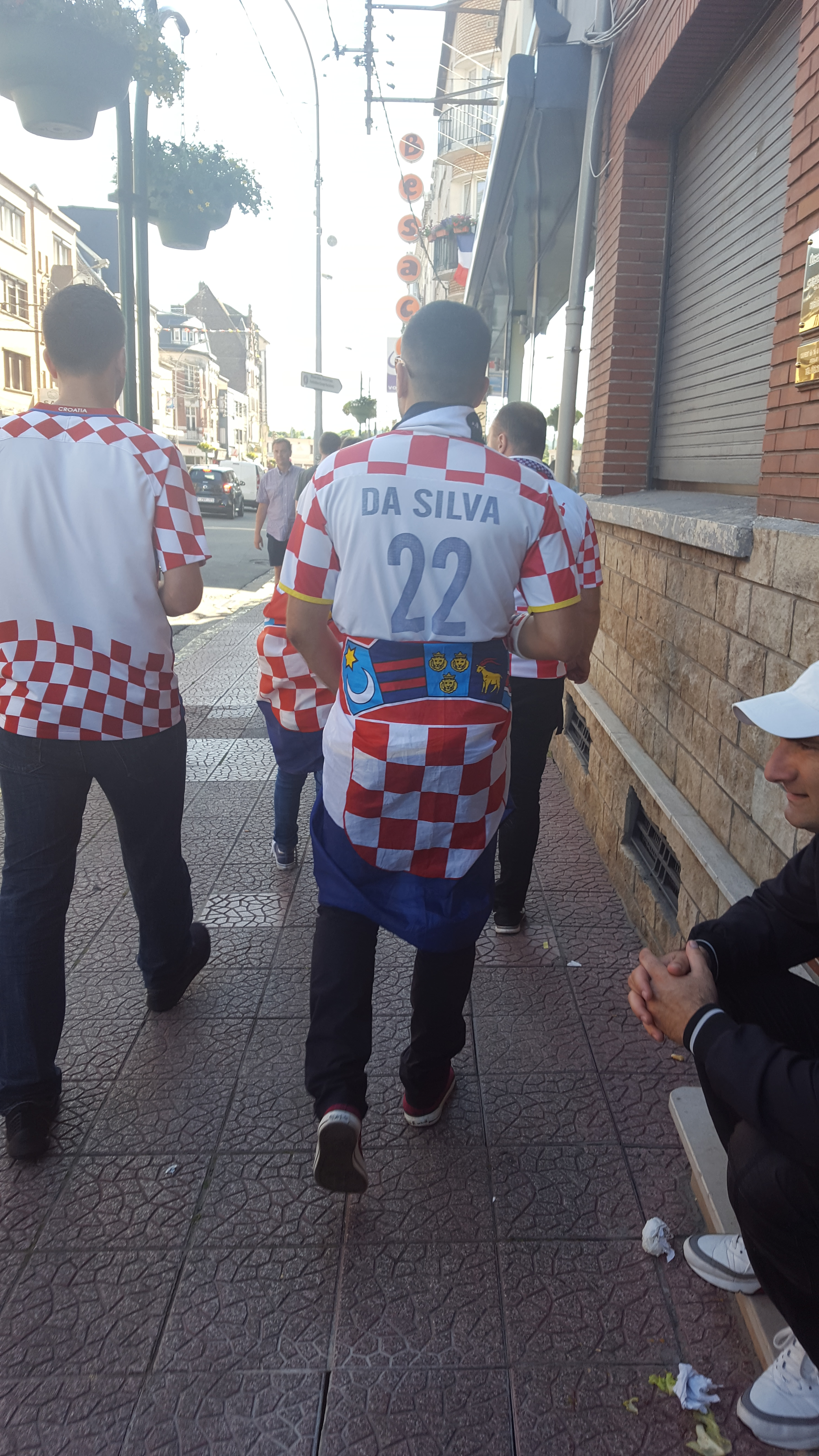 Supporter croate, portant un maillot floqué au nom d'Eduardo da Silva, dans les rues de Lens, le 25 juin 2016.